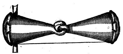 Le canon le plus simple, gravure du Cavalerice françois, Salomon de La Broue (ed.1610)